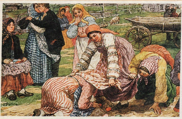 Ф. Сычков. Игра в кучки. Пасхальная дореволюционная открытка. Игра в кучки считалась забавой для девушек. Одна из девиц, которая не принимала участия в обряде, насыпала несколько больших кучек из песка. Их могло быть много, но главное — не менее чем по две на каждую участницу. Под одну кучку из пары заранее пряталось яйцо. Кучки засыпались так, чтобы все выглядели одинаковыми. Играющие угадывали, где спрятано яйцо. Если удалось с первого раза, это расценивалось как знак удачи на ближайшее время.